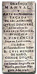 Portada de la edición príncipe de Oráculo manual y arte de prudencia (1647), de Baltasar Gracián